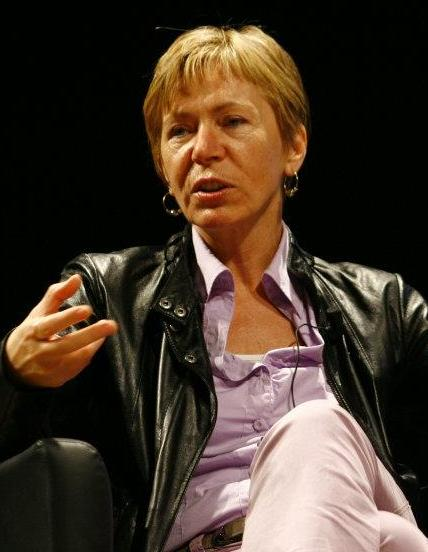 Milena Gabanelli al Festival Internazionale del Giornalismo di Perugia.